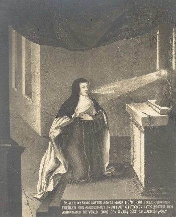 Agnes Maria Gräfin Huyn von Amstenraedt, Klosterfrau (Annuntiate) in Venlo